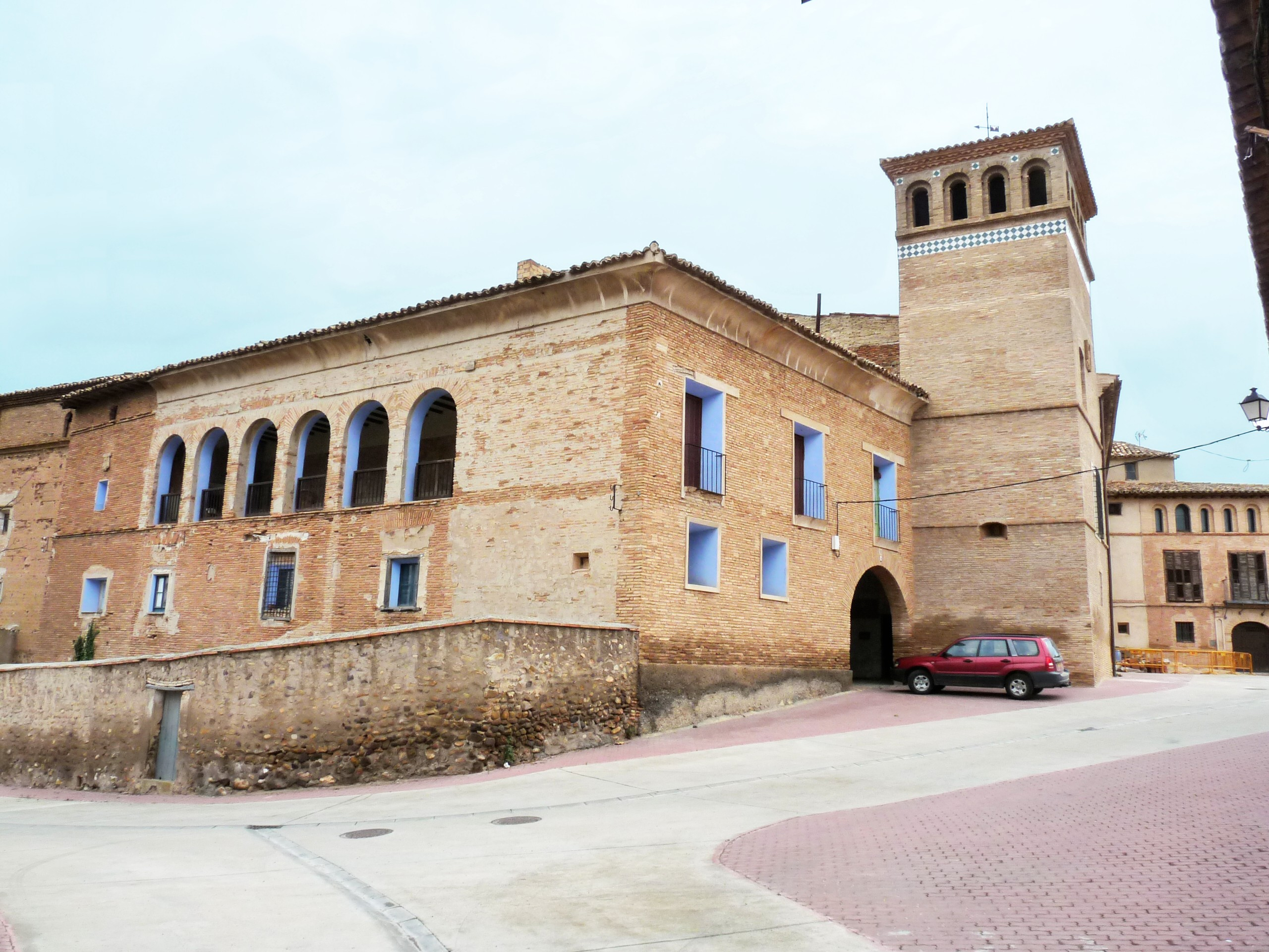 Ambel - Palacio de los Hospitalarios (siglo XVI) - Lateral con galería de arquillos